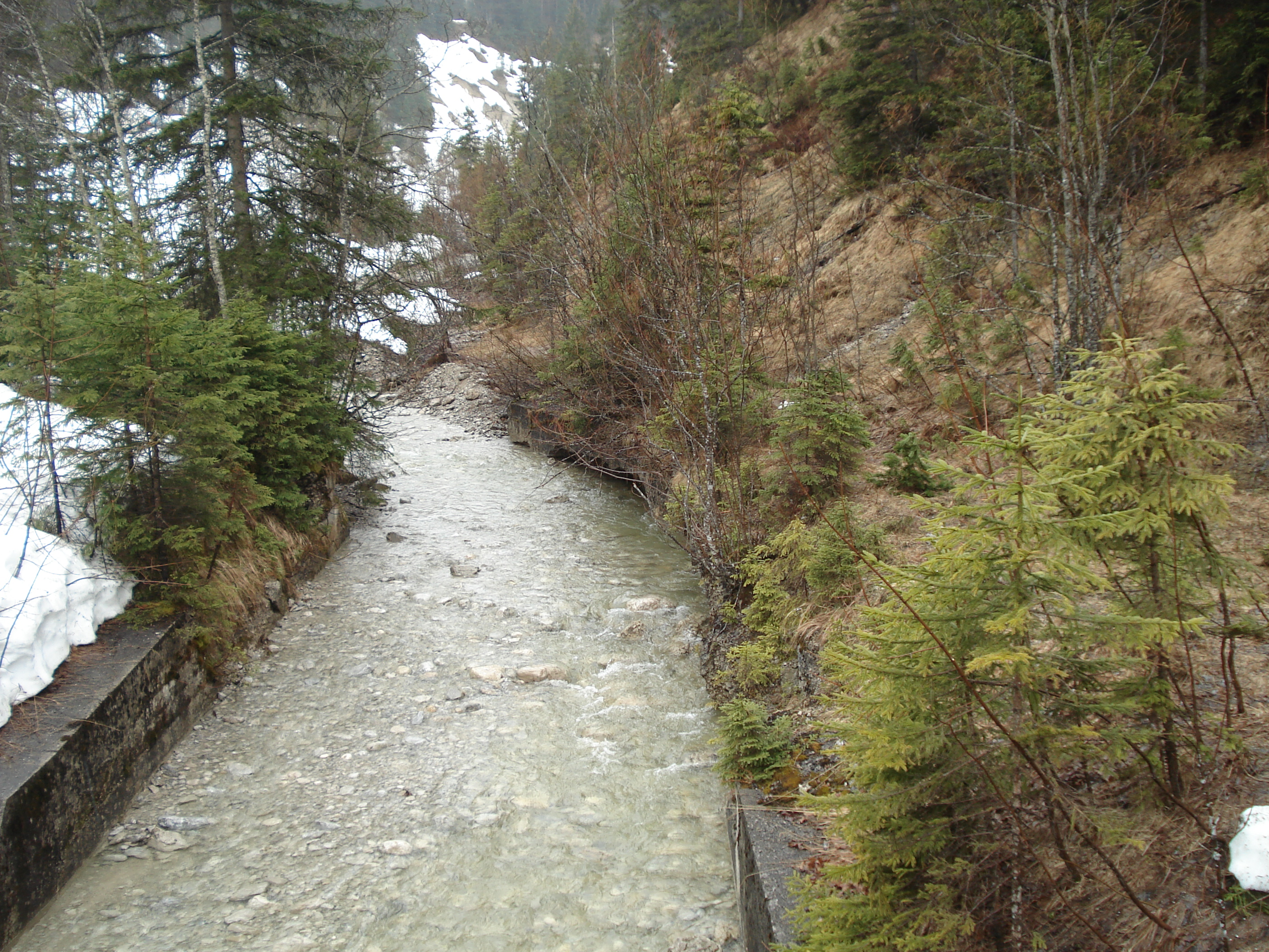 Der Fischbach vor dem Zusammenfluss mit dem Neualmbach zur Linder. Der Fischbach ist hier Grenzbach zwischen Deutschland (rechts) und Österreich (links).